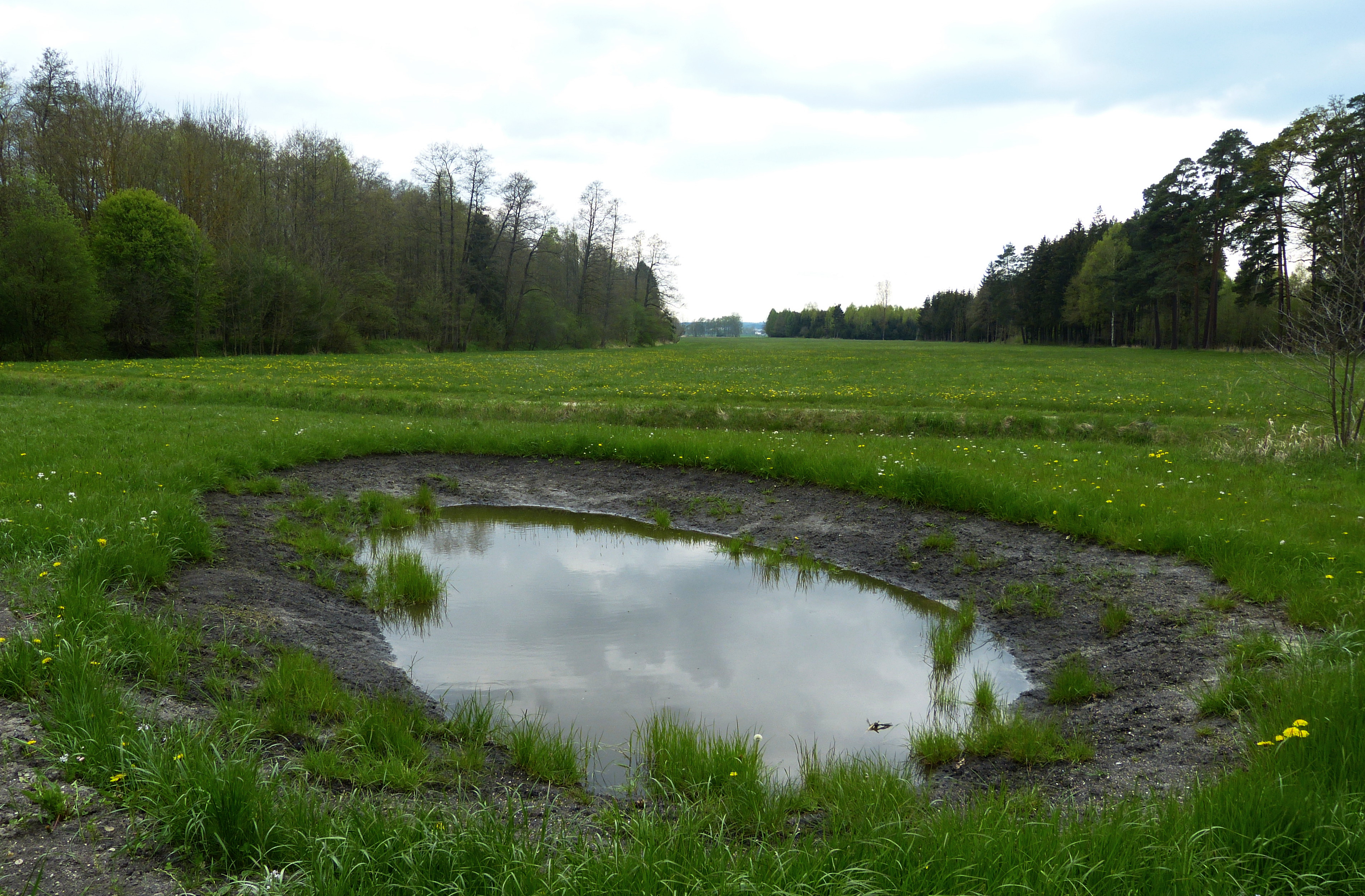 Wasserloch im Dinkelscherbener Moor, im Landschaftsschutzgebiet Augsburg - Westliche Wälder, Natura 2000 Fauna-Flora-Habitat-Gebiet Nr. 555521984.